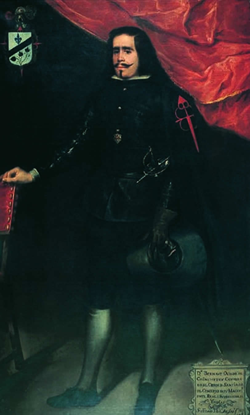 Retrato del aristócrata Bernabé Ochoa de Chinchetru († 1698), que fue caballero de la Orden de Santiago.